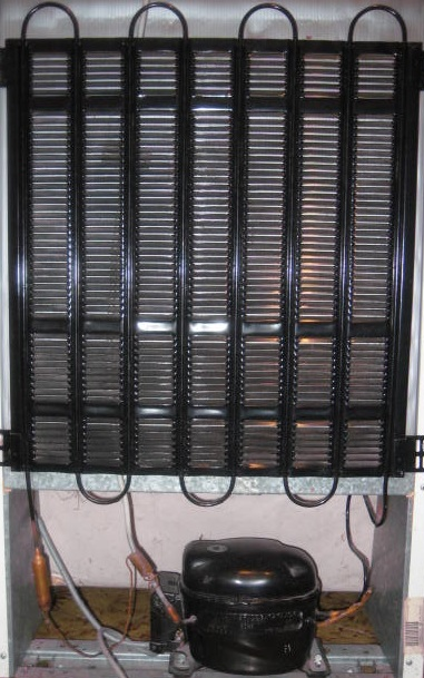 Tipiche componenti di un frigorifero domestico; nel caso in foto si tratta di un frigorifero Ignis.